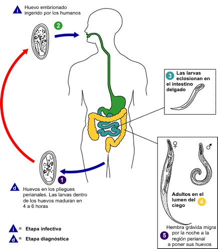 Los huevos son depositados en los pliegues perianales. La autoinfección ocurre por la transferencia de huevos infectivos a la boca con las manos que han rascado la zona perianal. La infección persona a persona también puede ocurrir a través de la manipulación de de ropa contaminada o sábanas. La enterobiasis también puede ser adquirida a través de superficies contaminadas con huevos en el medio ambiente (p.ej., cortinas, alfombras). Un pequeño número de estos huevos pueden ser ingeridos y seguir el mismo ciclo de desarrollo que los huevecillos ingeridos directamente. A continuación de la ingestión de huevos infectivos, las larvas eclosionan en el intestino delgado, y los adultos se establecen en el colon. El tiempo que transcurre entre la ingestión de los huevecillos y la primera ovoposición de parte de las hembras adultas es de alrrededor de un mes. La expectativa de vida para un adulto es de aproximadamente dos meses. Las hembras grávidas migran por la noche saliendo por el ano y ponen sus huevecillos en la piel de la región perianal. La larva contenida en el huevo se vuelve infectiva en unas 4 a 6 horas bajo condiciones óptimas. La retroinfección, o la migración de larvas recién eclosionadas desde la región perianal al recto, puede ocurrir, aunque la frecuencia con que esto ocurre es desconocida.